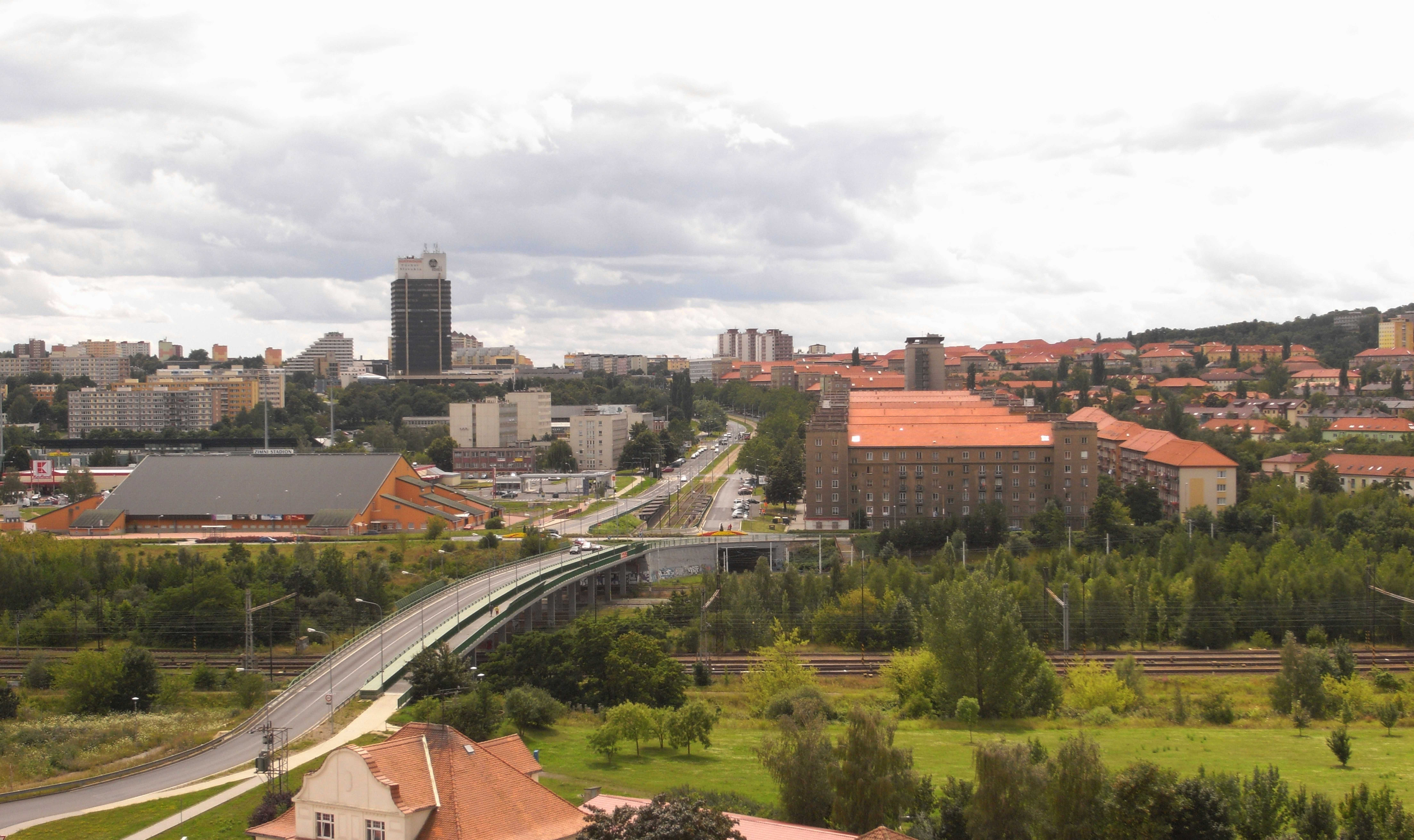 Die Neubebauung der Stadt Most (Nordböhmen, Tschechische Republik)